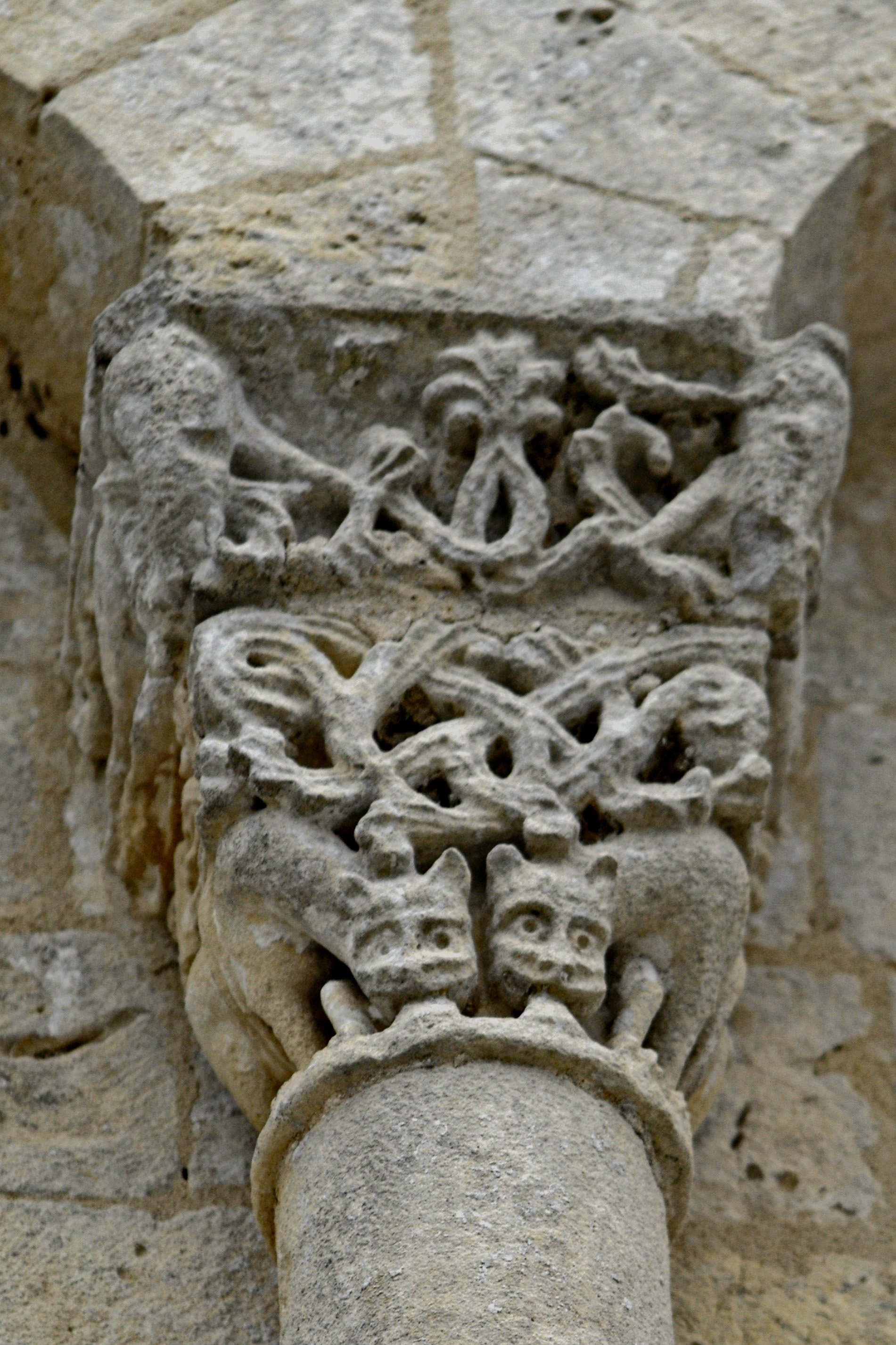 Notre-Dame Corme-Écluse, Kapitell OG Nr. 13